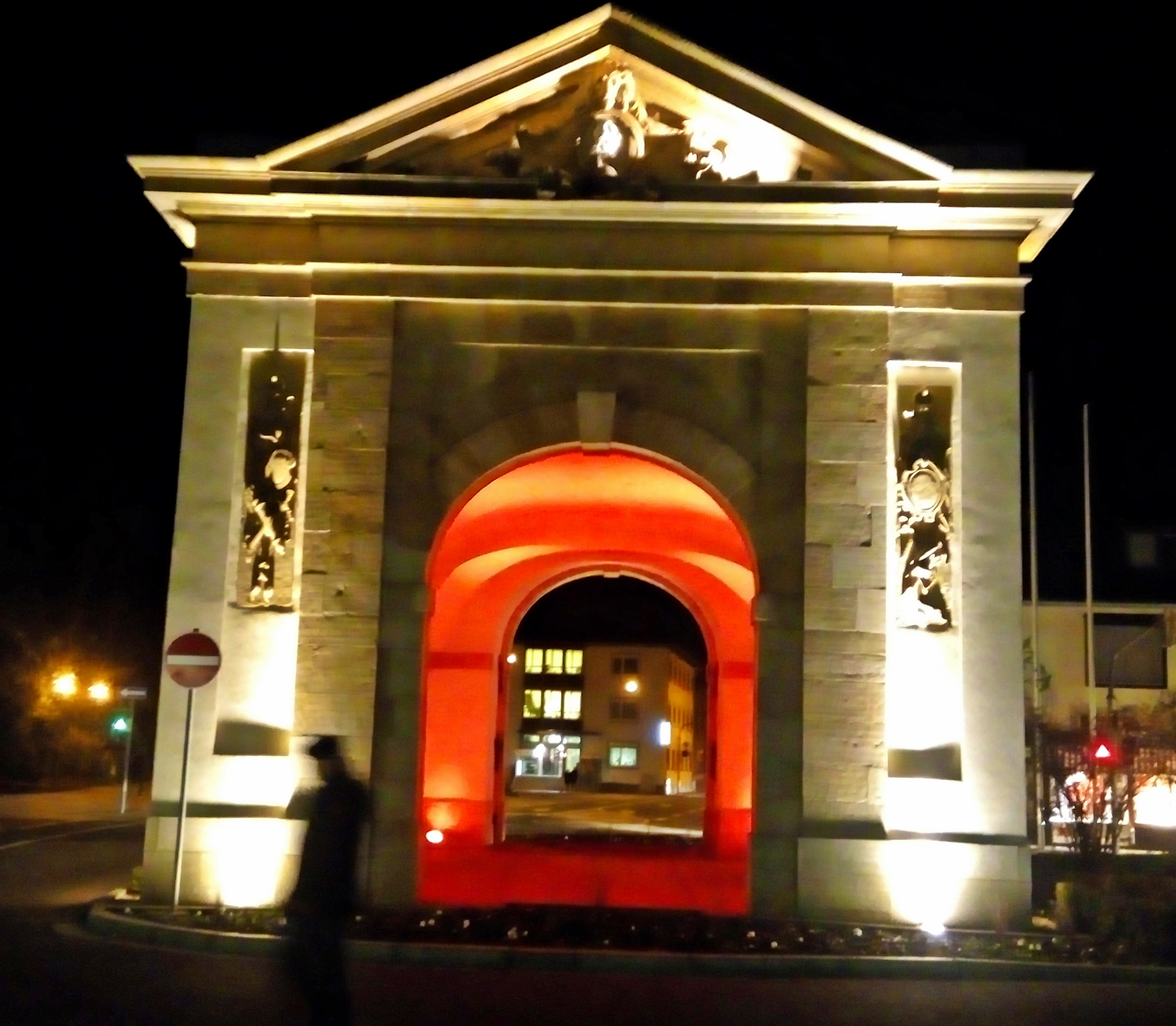 Frankenthal Wormser Tor, nachts, beleuchtet